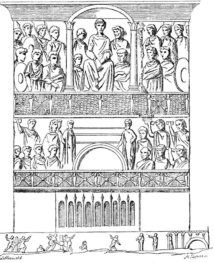 Fig. 36. Acclamations au cirque en présence de l'empereur. (Acclamatio on the Theodosius Colum.)